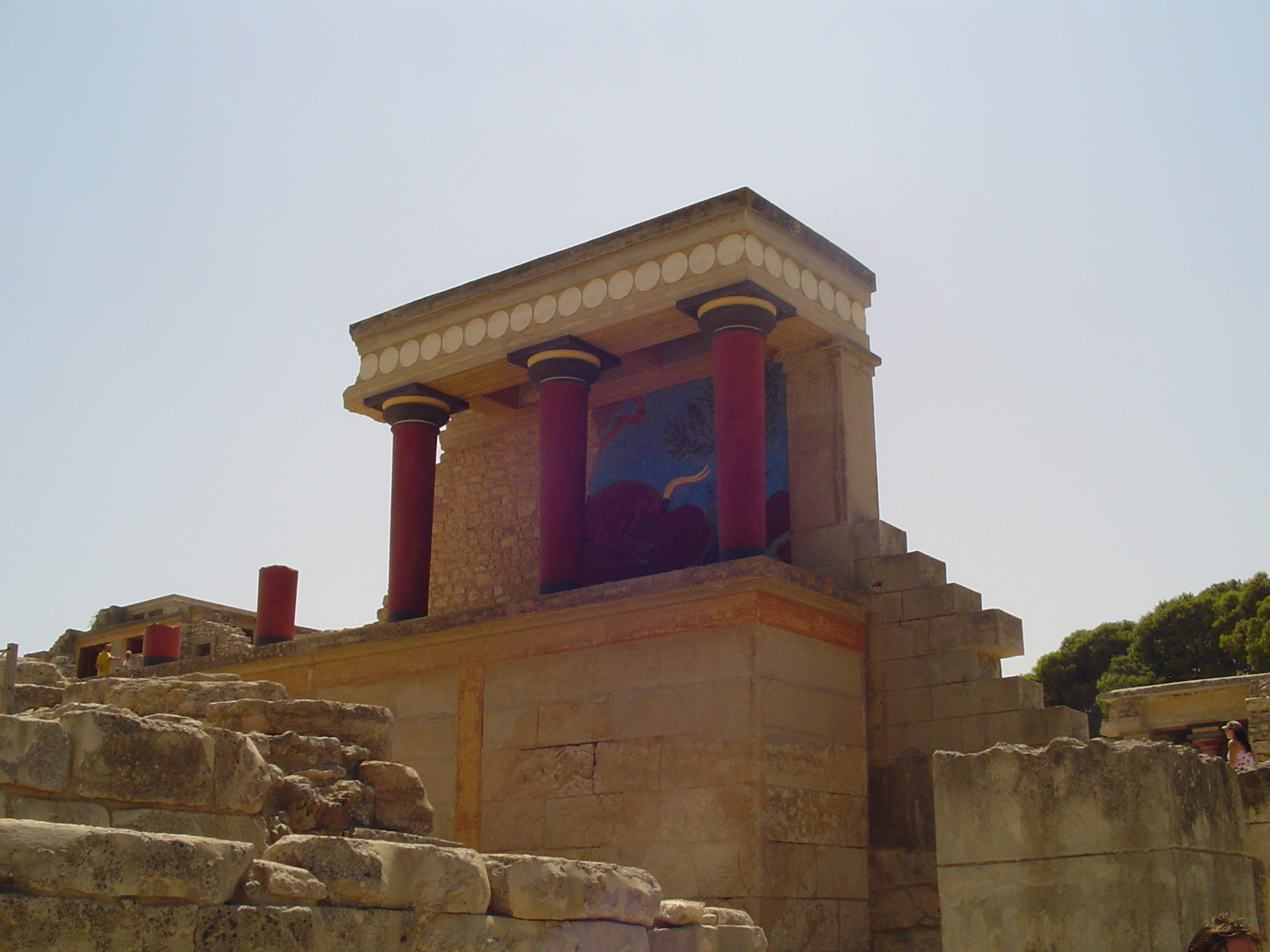 Knossos, Crete, Greece